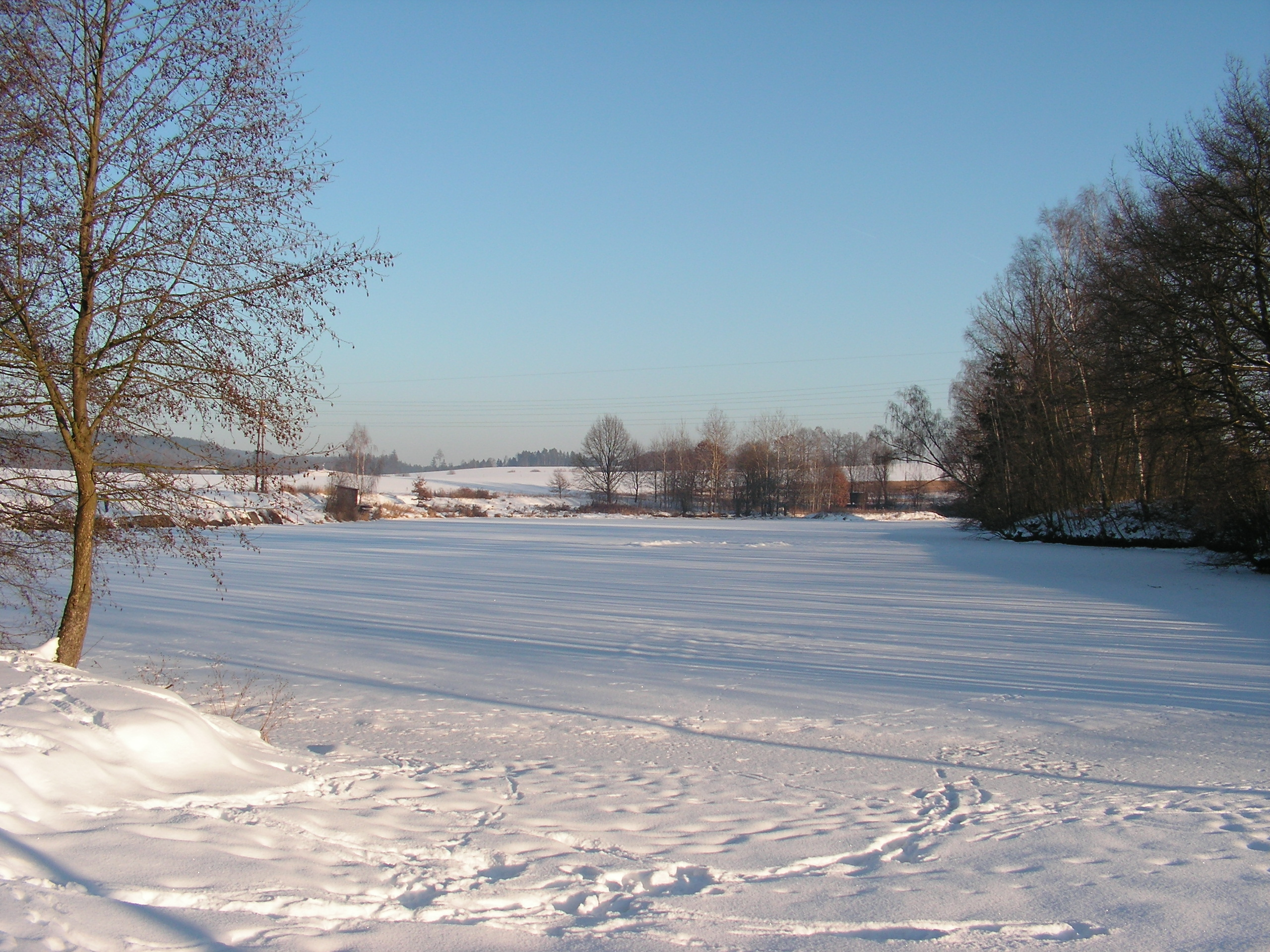 Rybník Sázavan u Světlé nad Sázavou